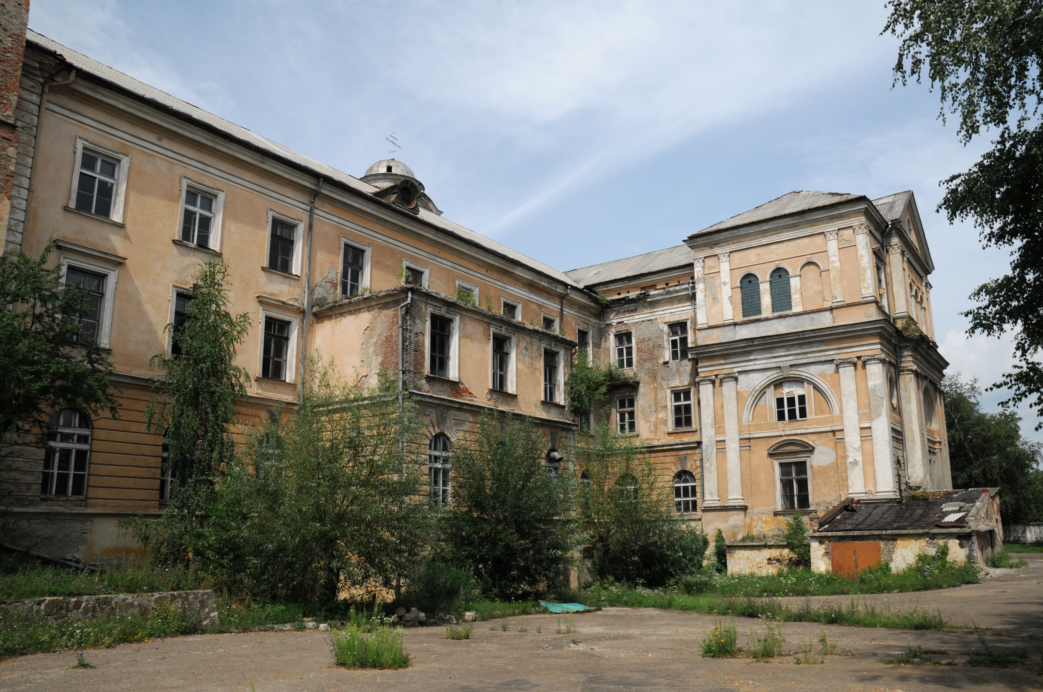 Хирів, конвікт